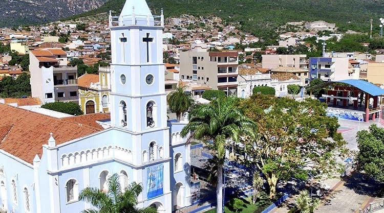 Igreja Matriz Vista do Alto